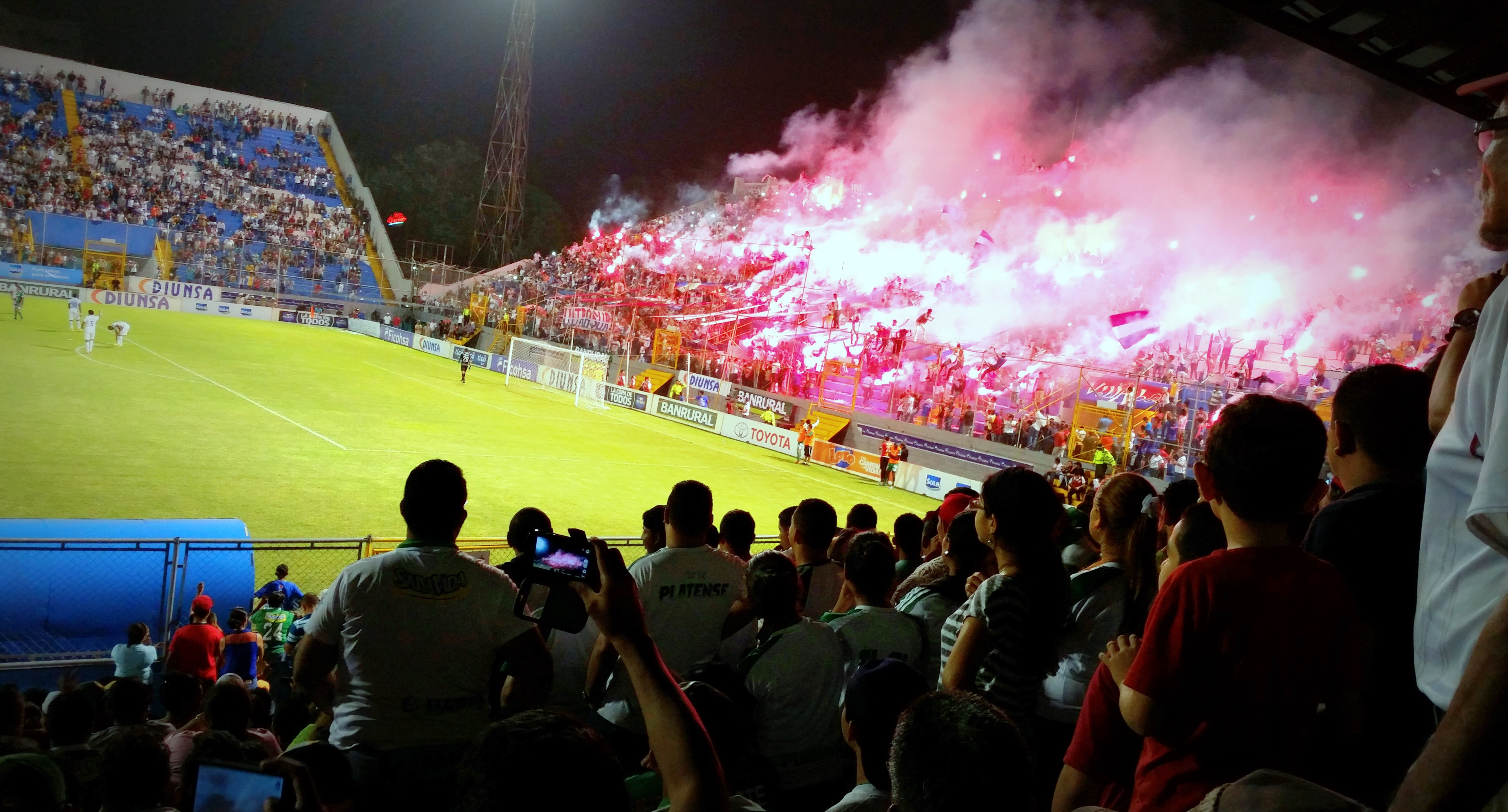 Barra de la Ultra Fiel durante el partido final de la Copa Presidente San Pedro Sula Honduras. Estadio Gral. Francisco Morazan